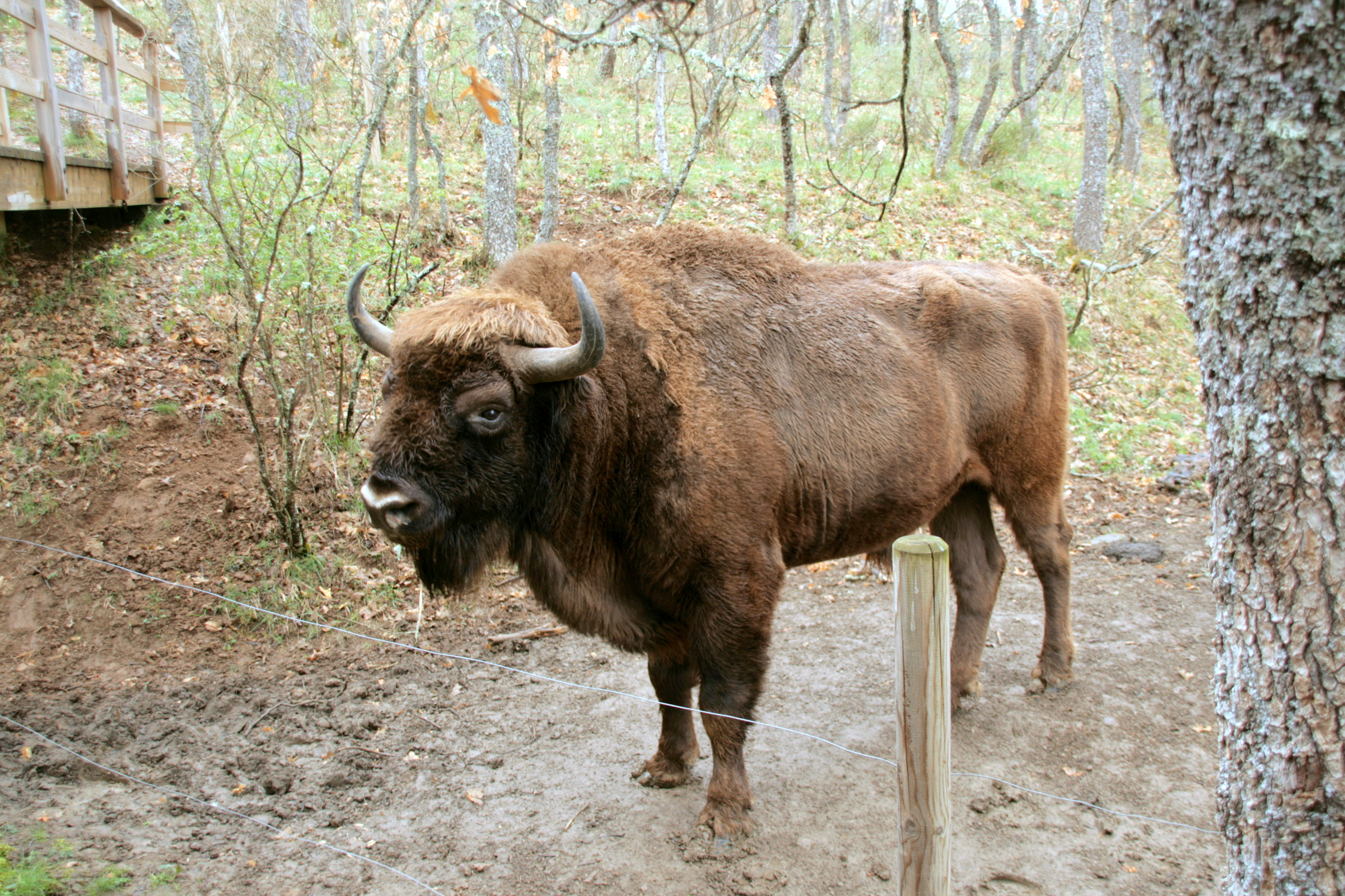 Bisontes europeos en en Bison Bosanus, Reserva y Centro de Interpretación del Bisonte Europeo de San Cebrián de Mudá (Palencia) This is a photography of a Special Area of Conservation in Spain with the ID: ES4140011. Natura2000 entry, EEA entry